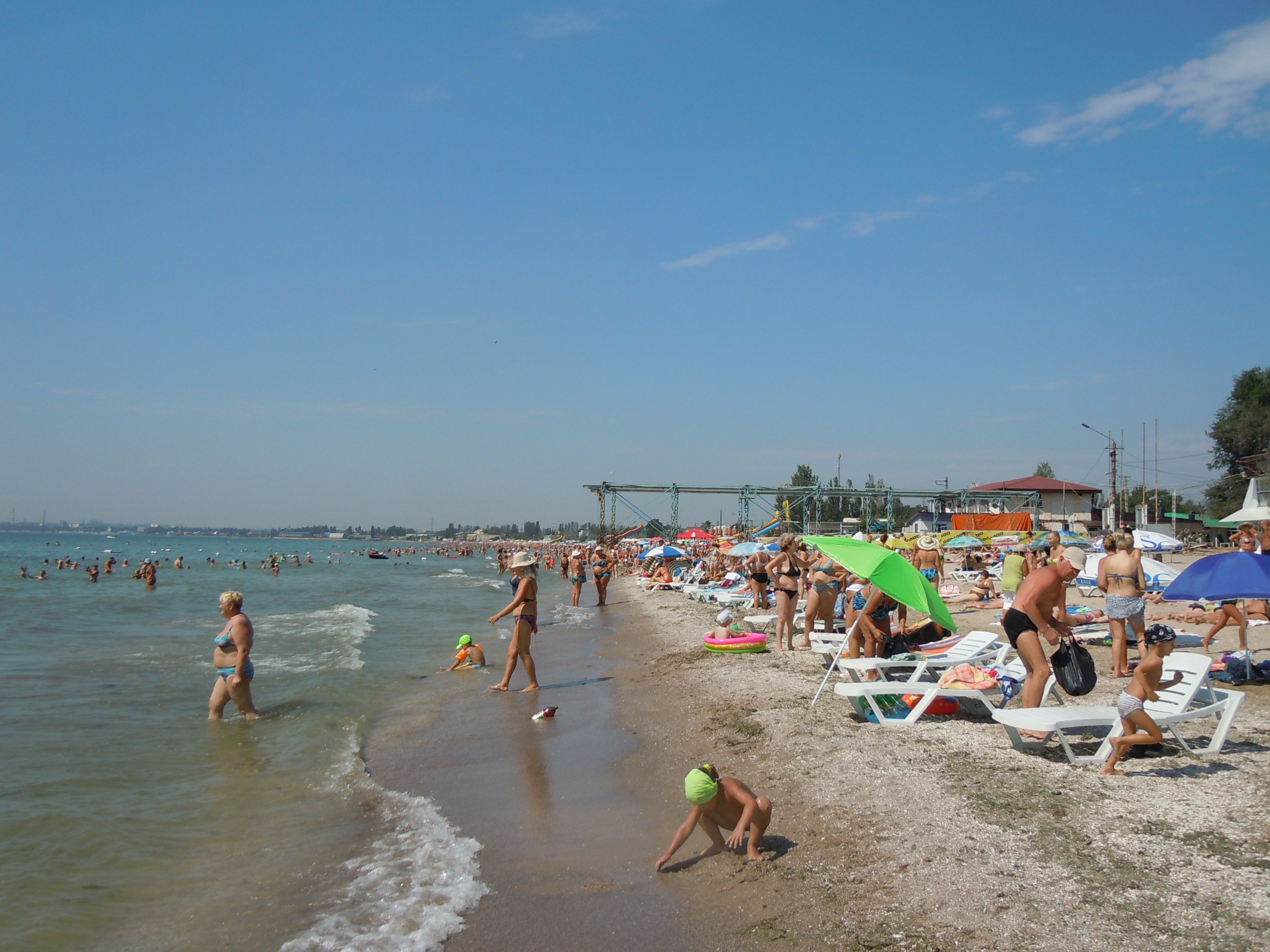 Пляж Лузанівка влітку, Одеса